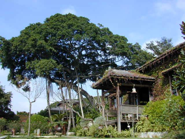 華陶窯人文庭園-大榕樹